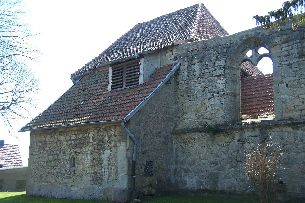 Ansicht von Norden.